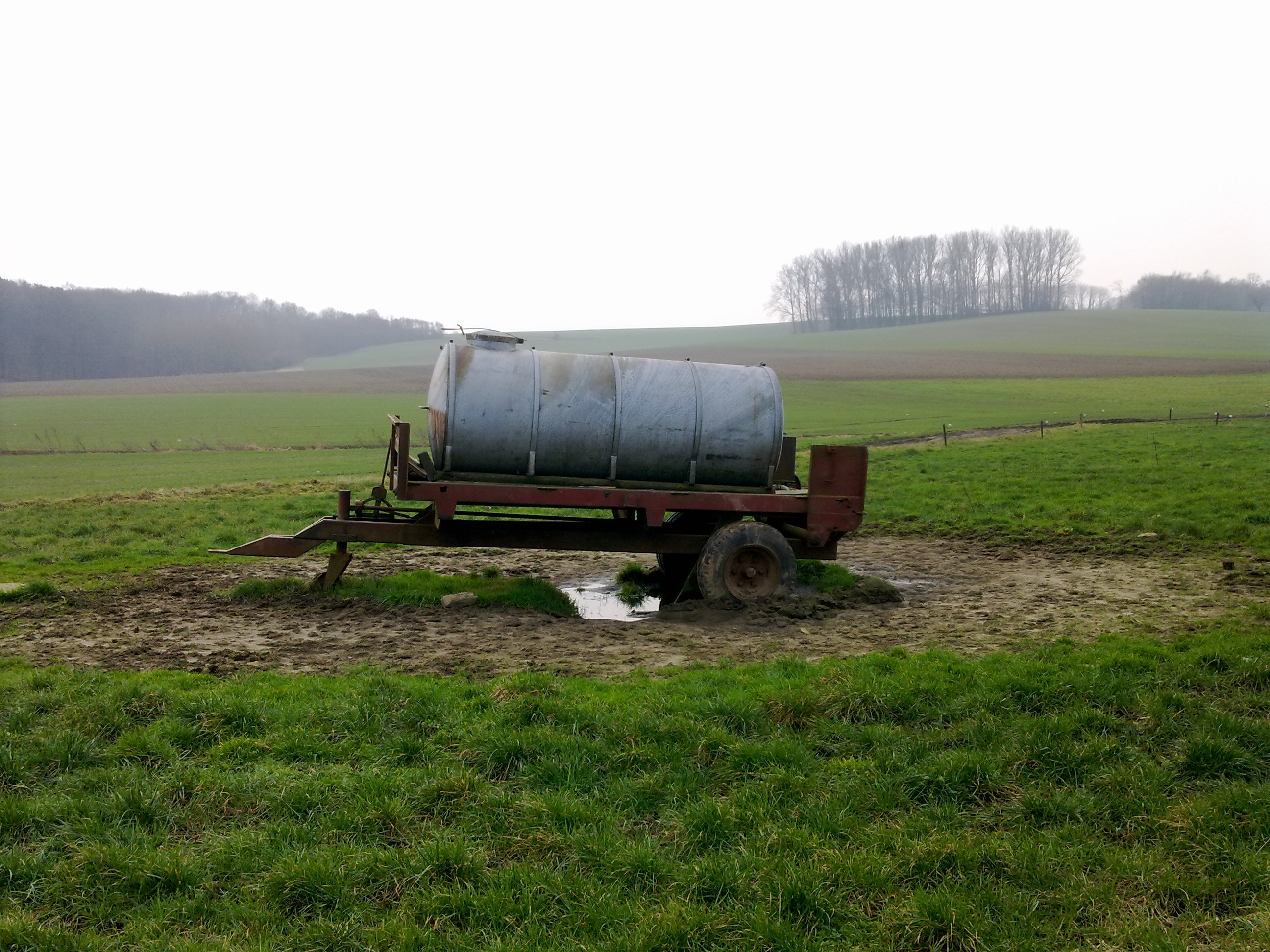 Citerne mobile dans un champ à Grez-Doiceau